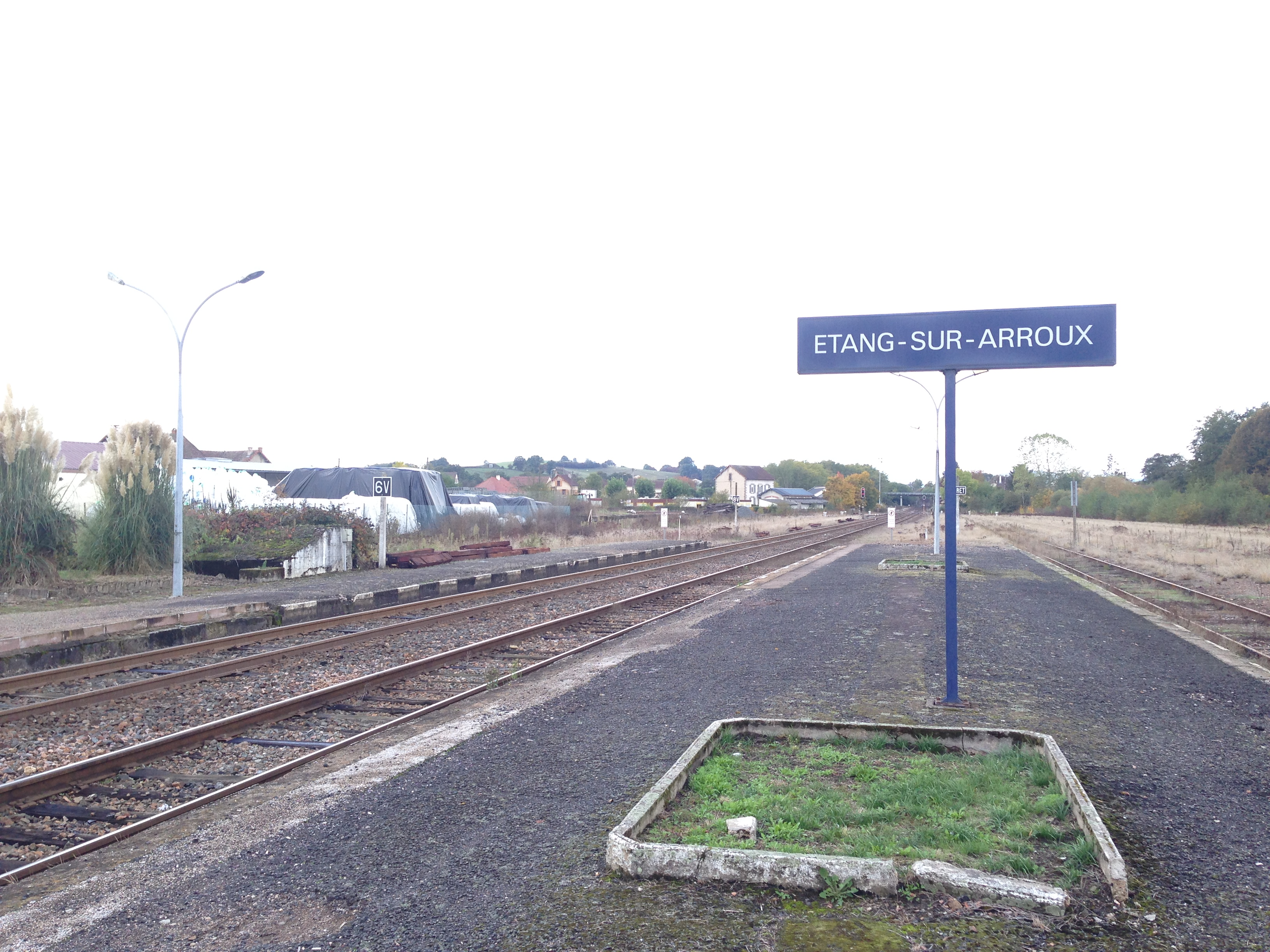 埃唐站.